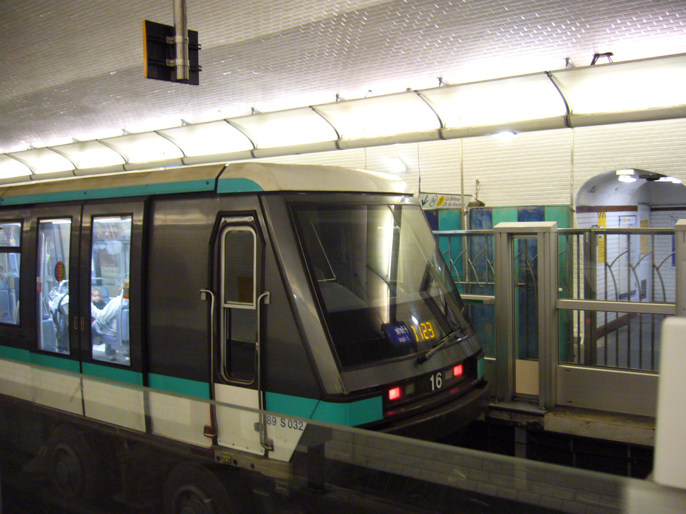 Installation des façades de quai à Bérault sur la ligne 1 du métro de Paris.